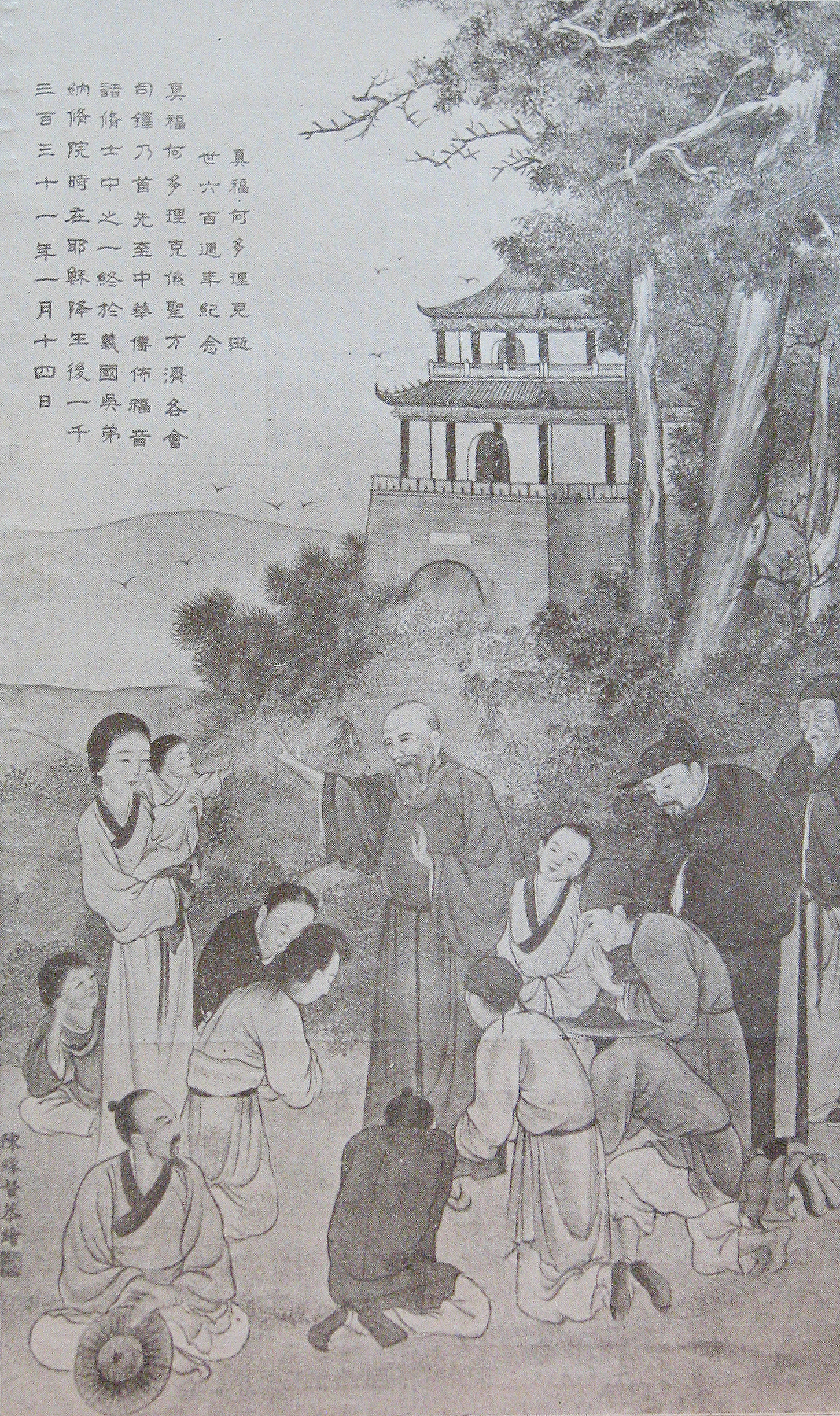 Bł. odoryk z Pordenone naucza chińskich chrześcijan. Rysunek na jedwabiu. Oryginł znajdował się w Nuncjaturze Watykanu w Pekinie. Skan z periodyku "VI Centenario del Beato Odorico da Pordenone.